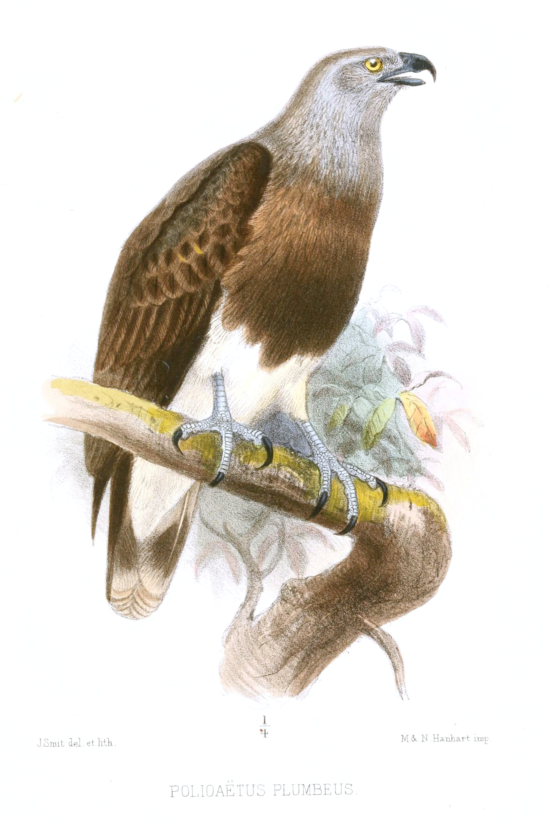 Polioaetus plumbeus (=Ichthyophaga humilis plumbeus)